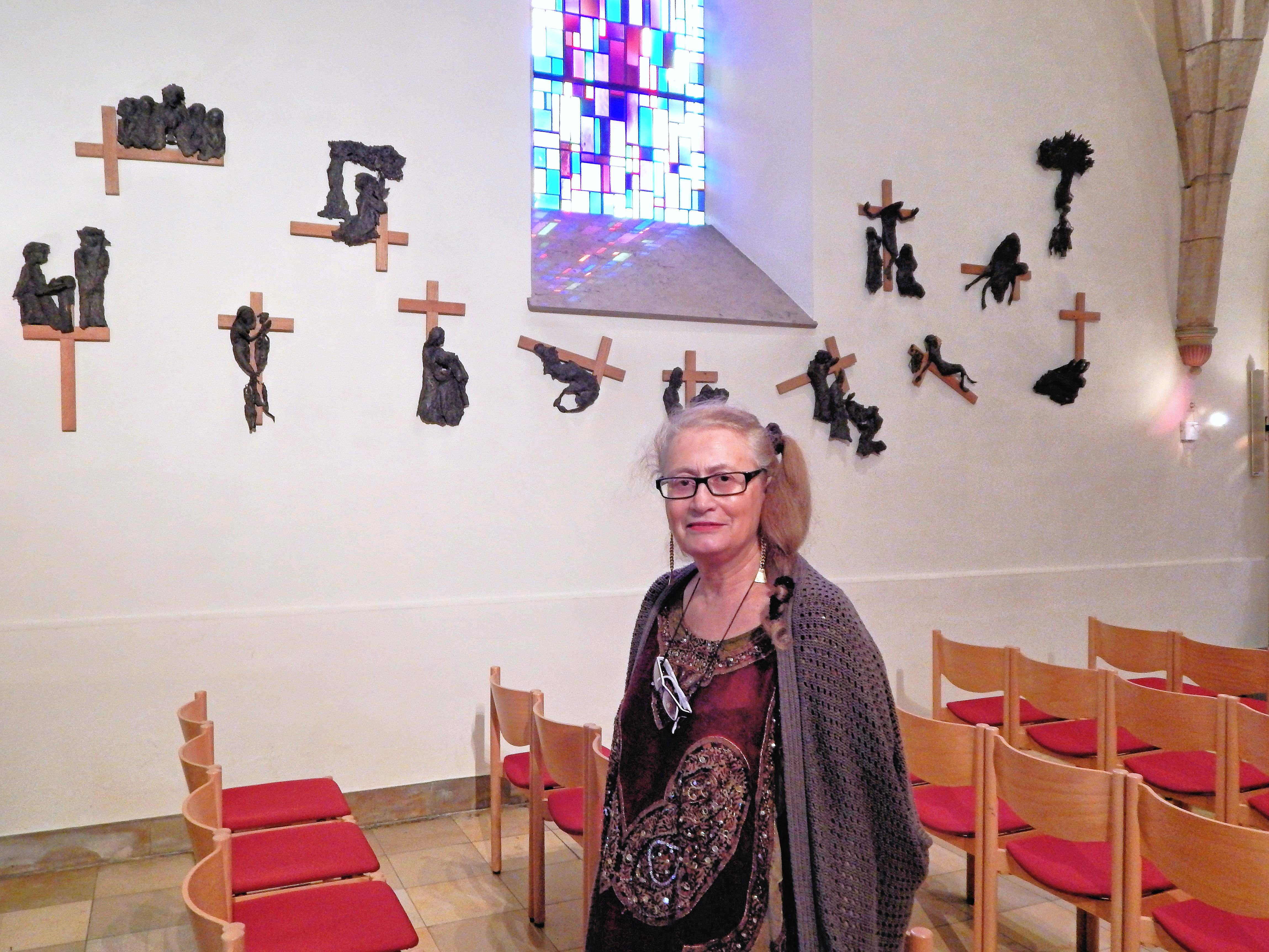 Bettina Scholl-Sabbatini, 2016, virun hirem Kräizwee an der Kierch zu Bartreng